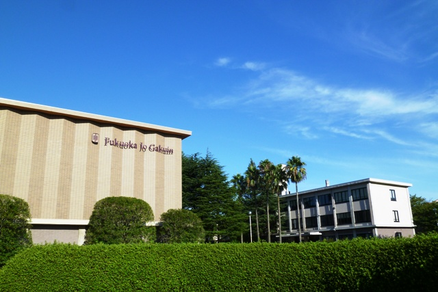 福岡女学院中学校・高等学校 ギール記念講堂